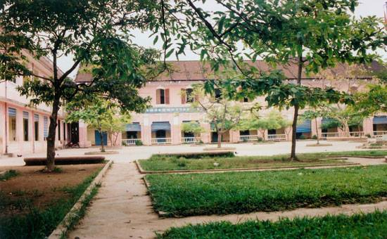 Trường THPT Nguyễn Trường Tộ xưa